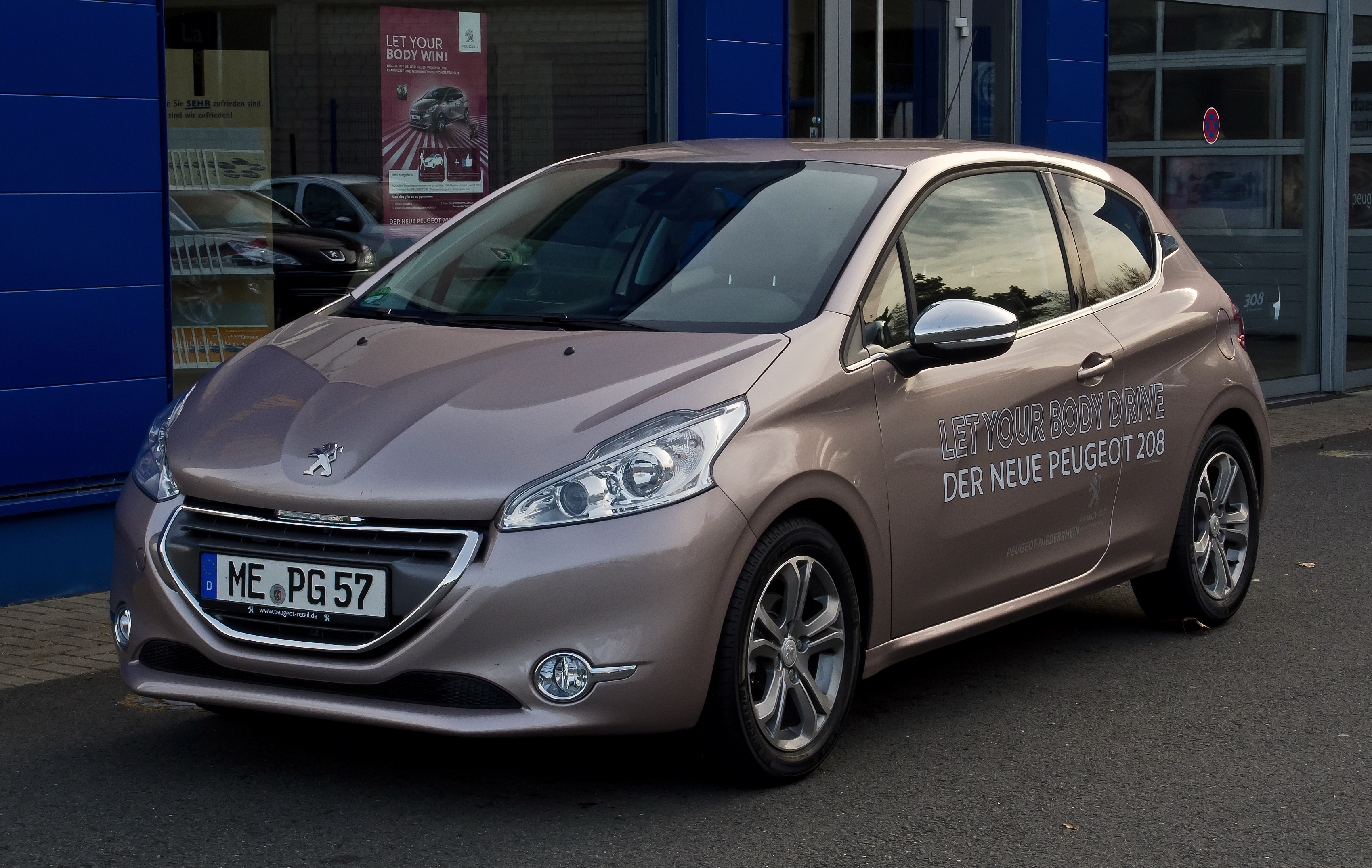 Peugeot 208 95 VTi Allure